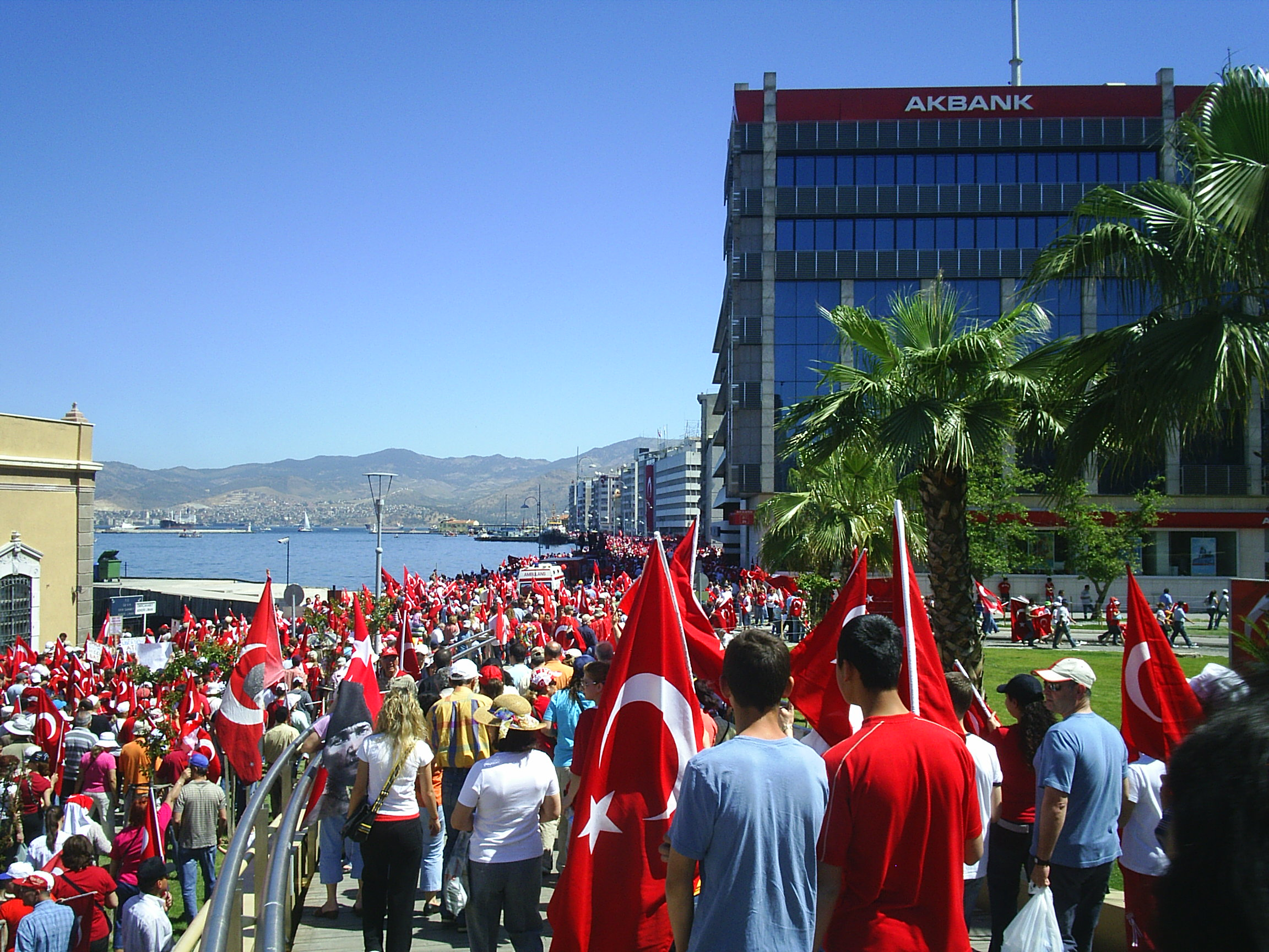 Protect Your Republic Protest, Gündoğdu square, İzmir